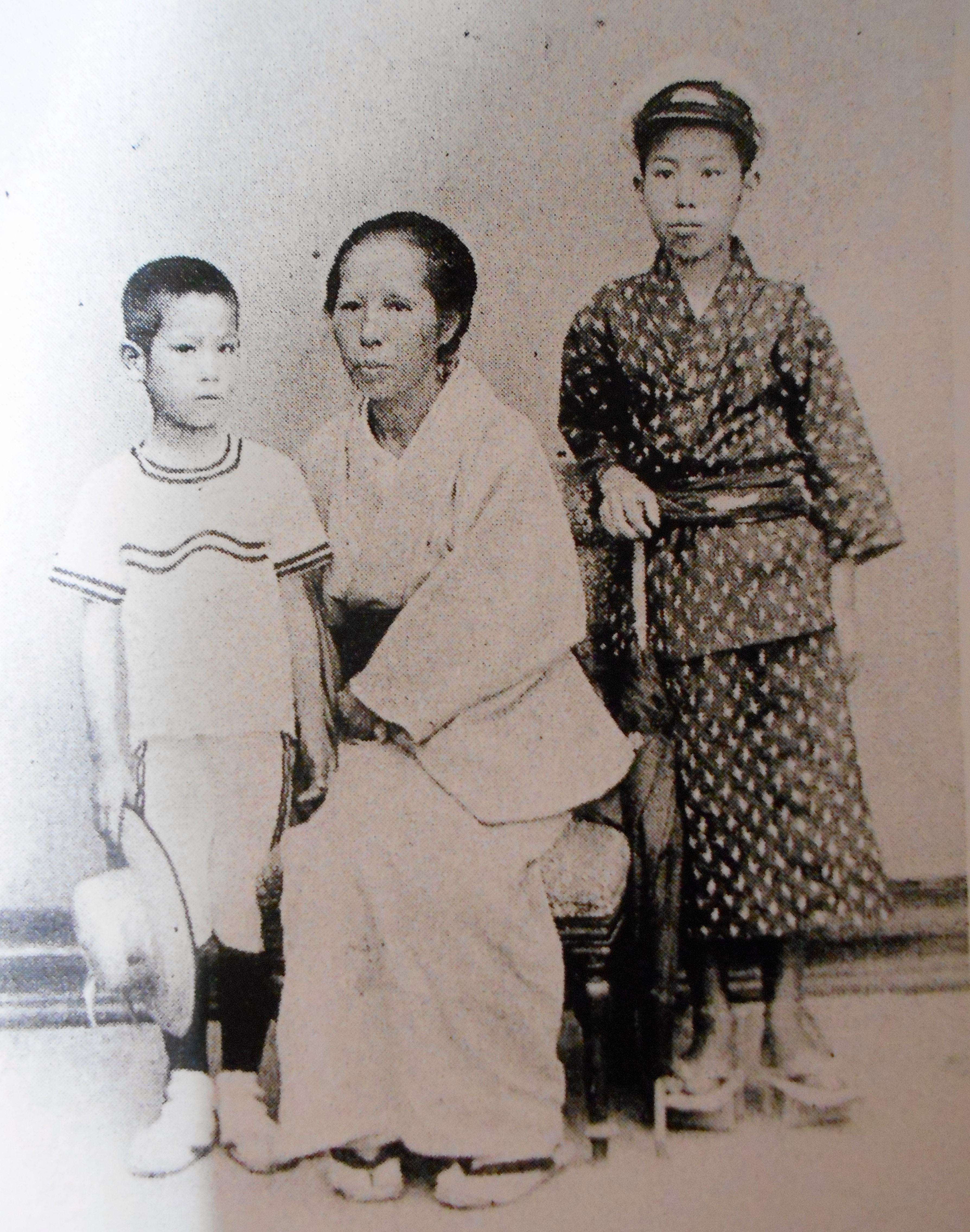 北川民次（左）、母親の北川きく（中央）、兄（右）